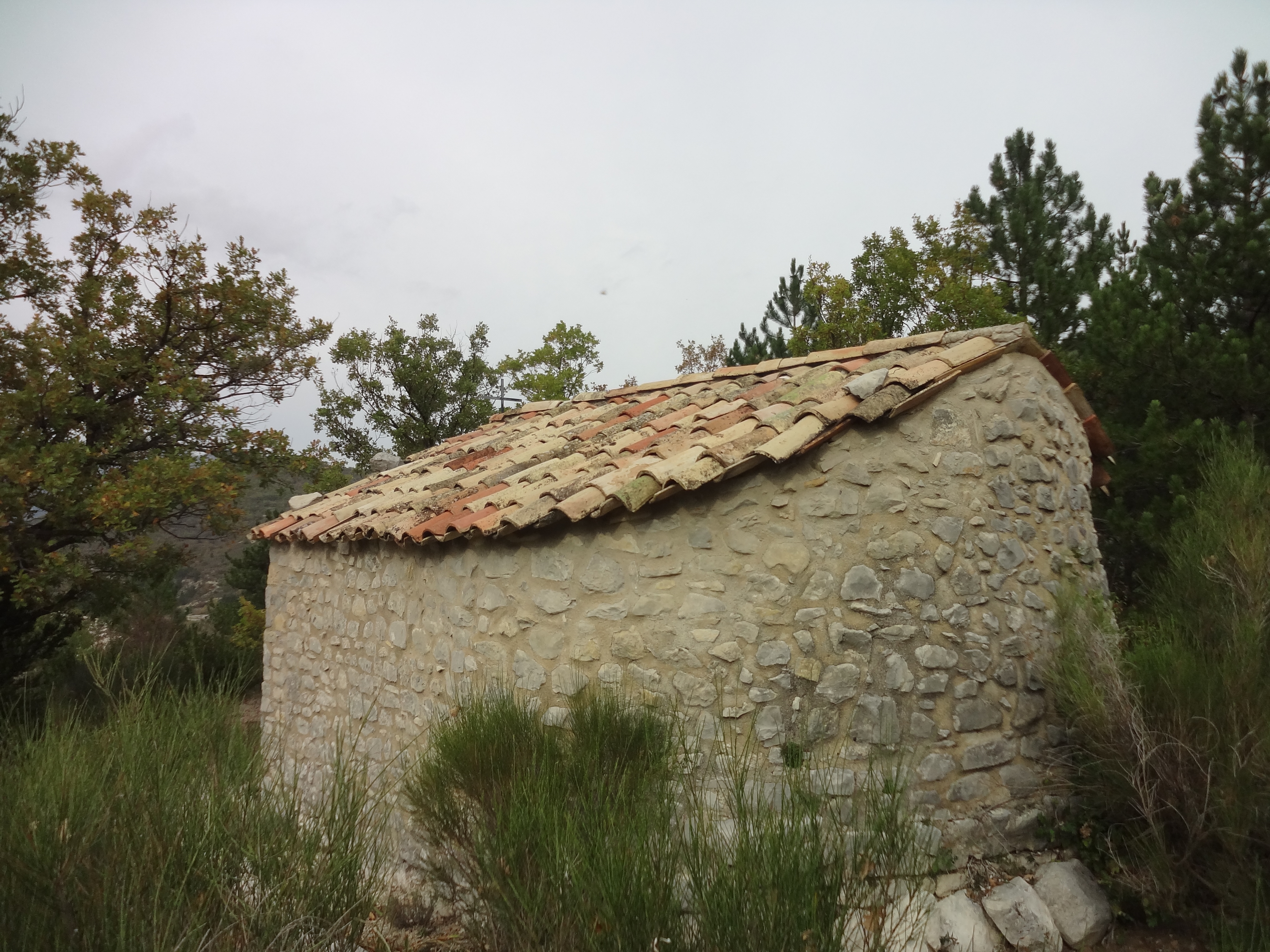 chapelle Saint-Honoré (selon la carte IGN) ou Saint-Honorat (selon le panneau en façade et Daniel Thiery de XVIIe siècle